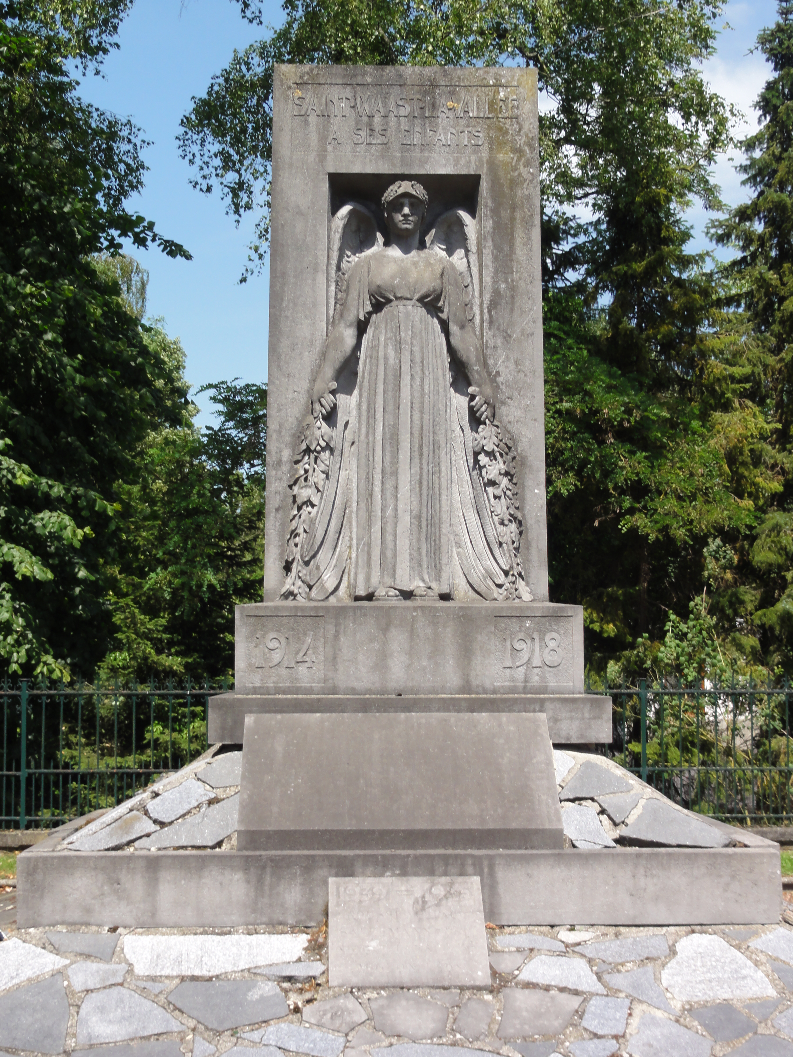 Saint-Waast-la-Vallée (Nord, Fr) monument aux morts.